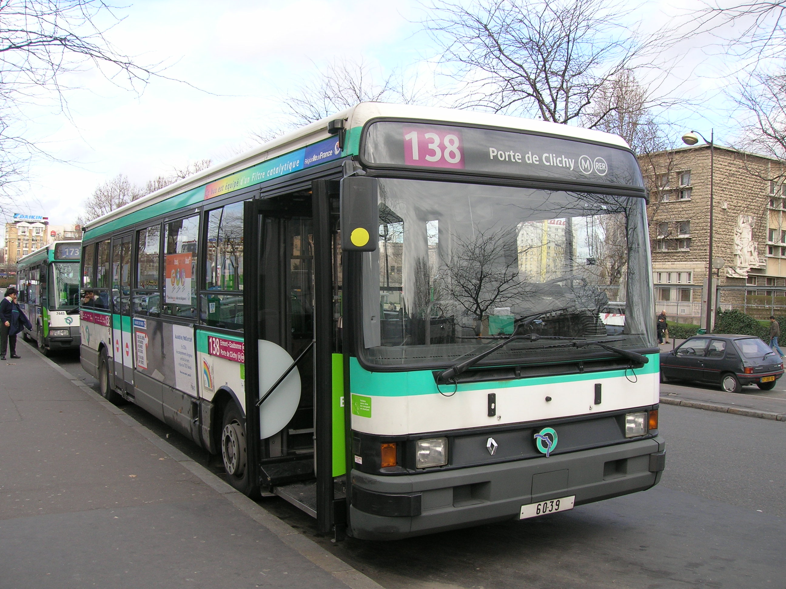 Bus Renault R312 sur la ligne 138 de la RATP au terminus Porte de Clichy, Paris